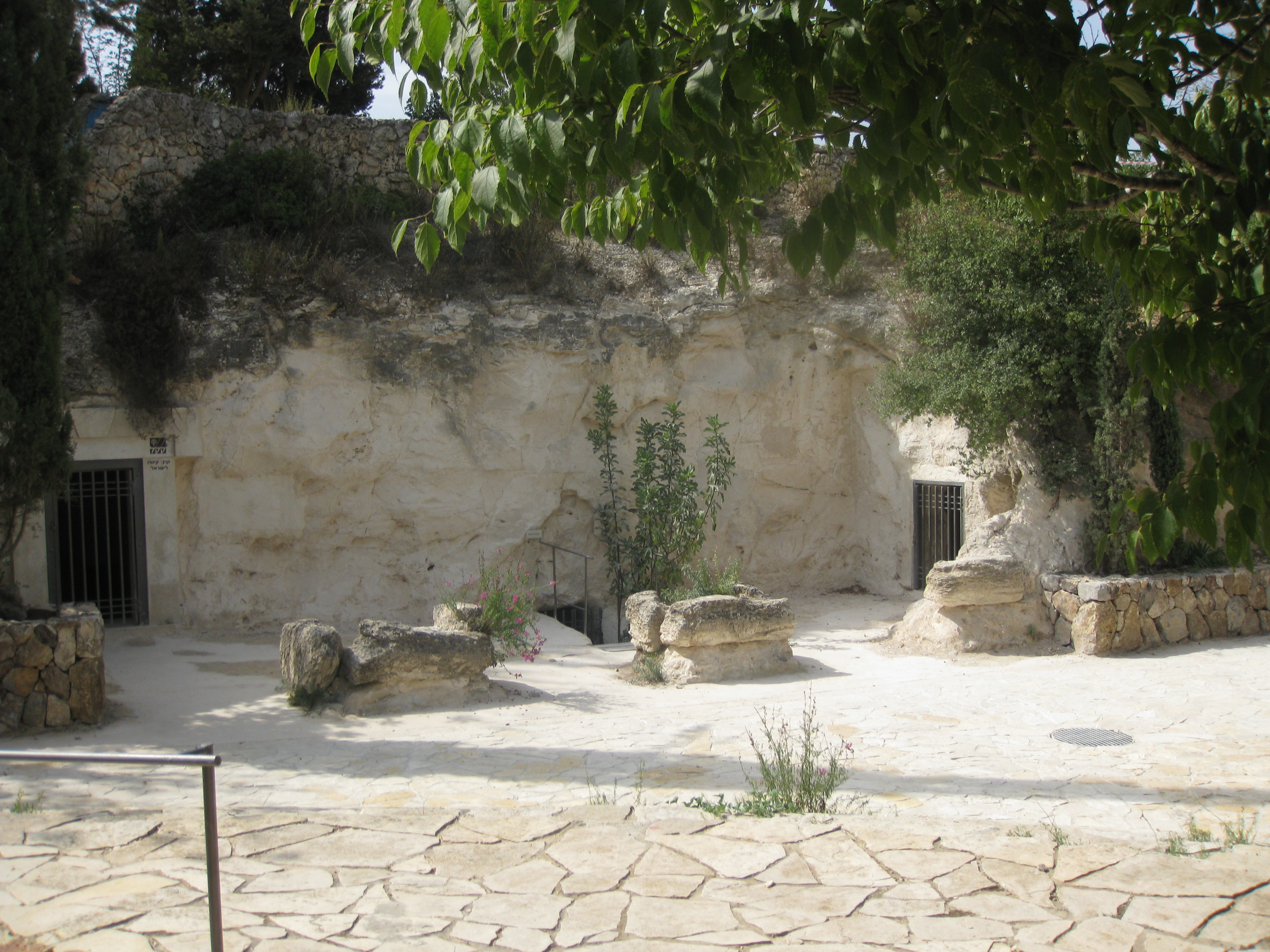 Mount Scopus הר הצופים